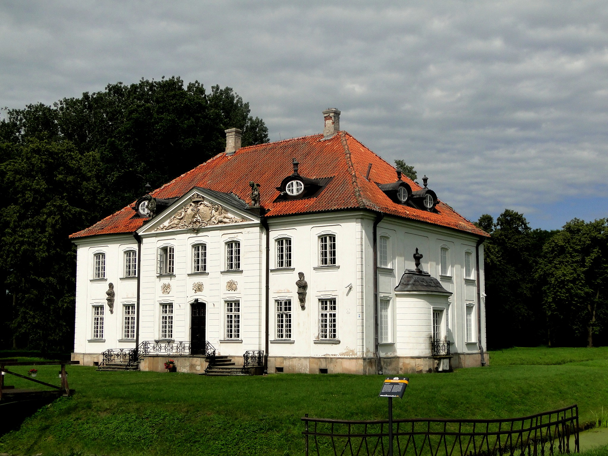 Pałac Branickich w Choroszczy. Obecnie Muzeum Wnętrz Pałacowych.